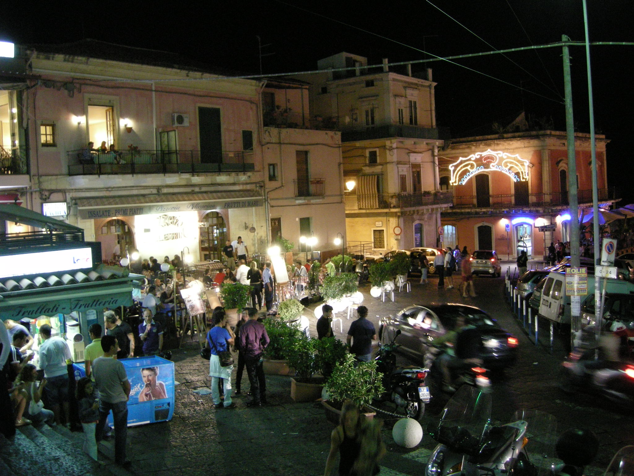 Acitrezza di notte